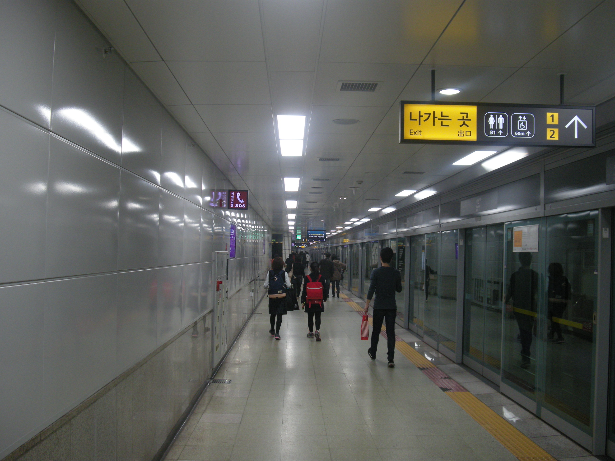 서울 지하철 5호선 마천역 당역 종착 승강장